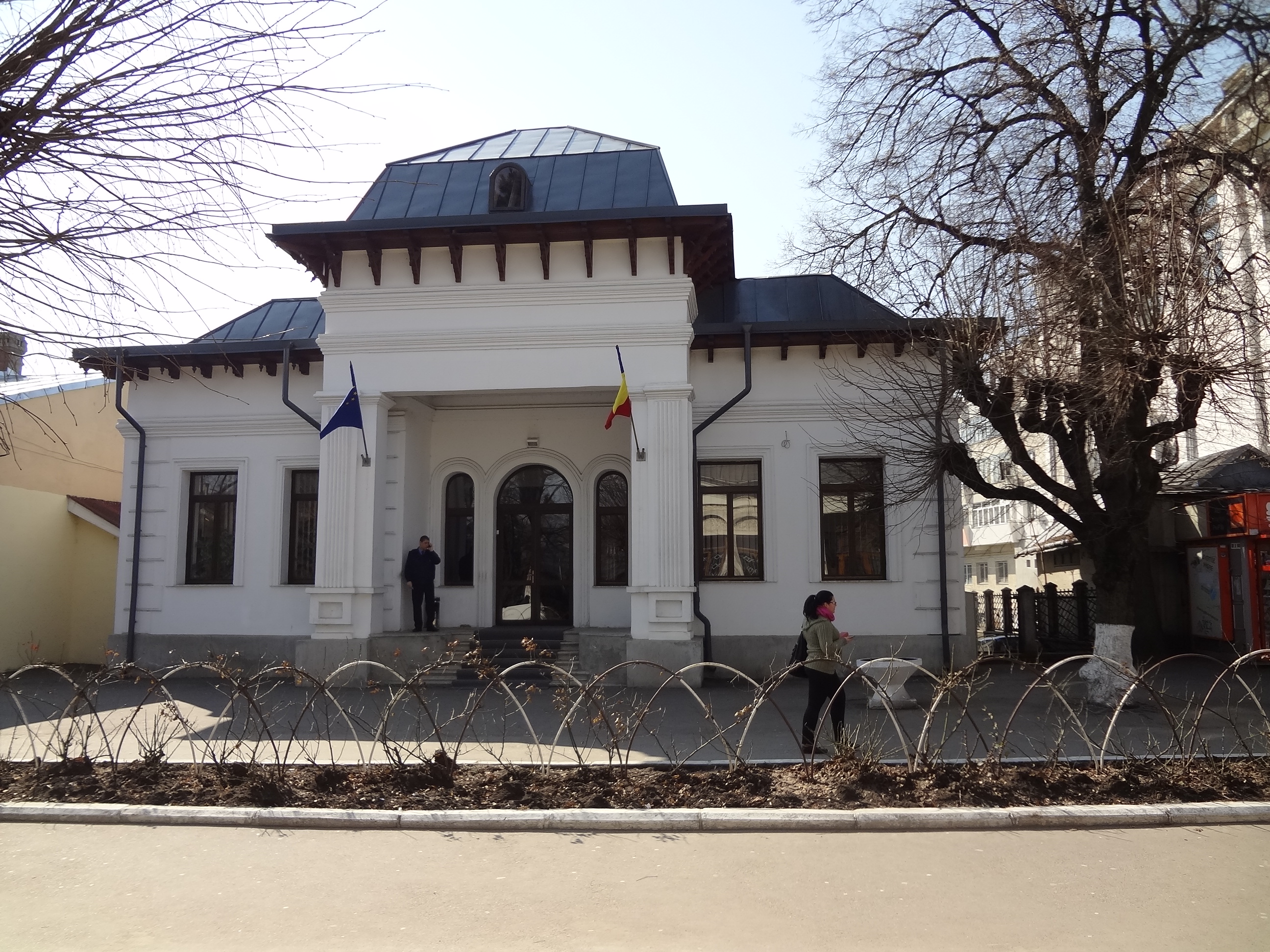 Falticeni architecture centre ville